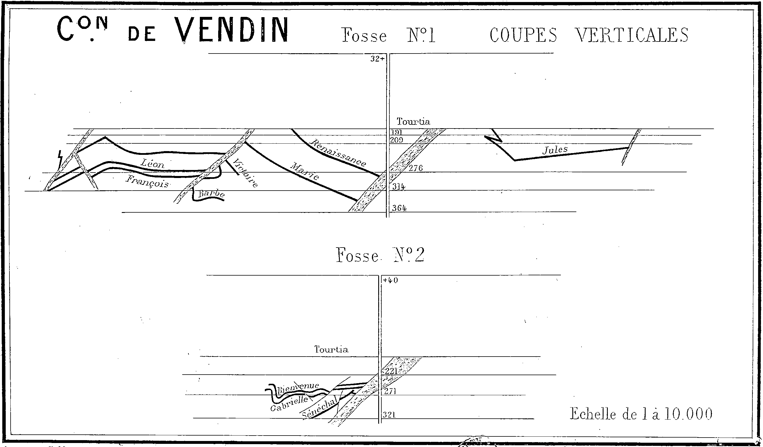 Coupe verticale des puits n° 1 et 2 de la Compagnie des mines de Vendin.